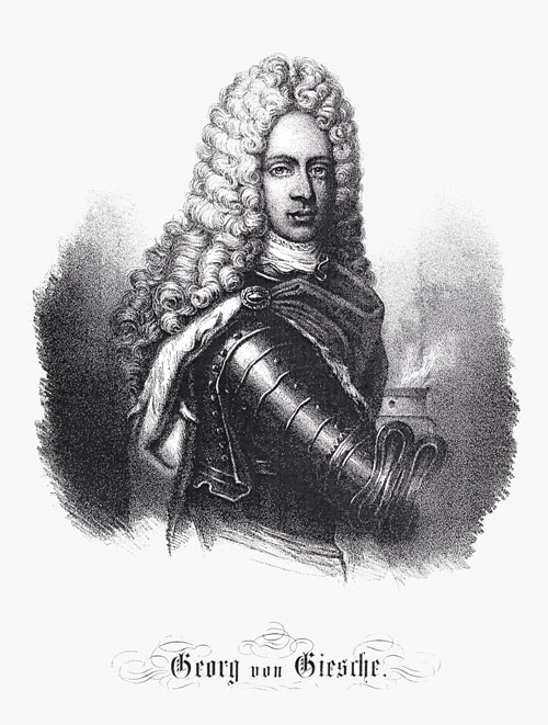 Portrait von Georg Giesche